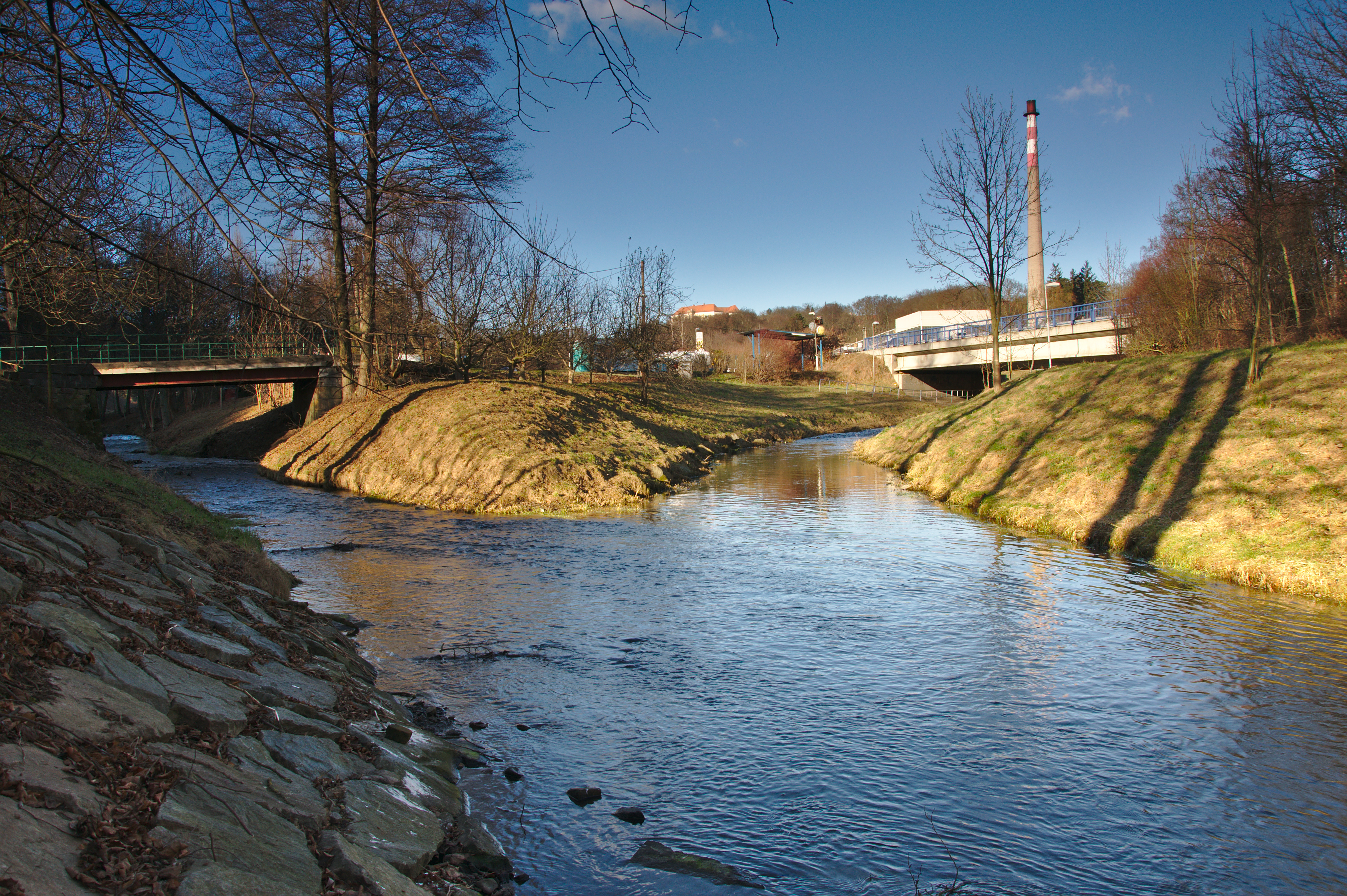 Soutok Křetínky a Svitavy v jižní části Letovic, okres Blansko